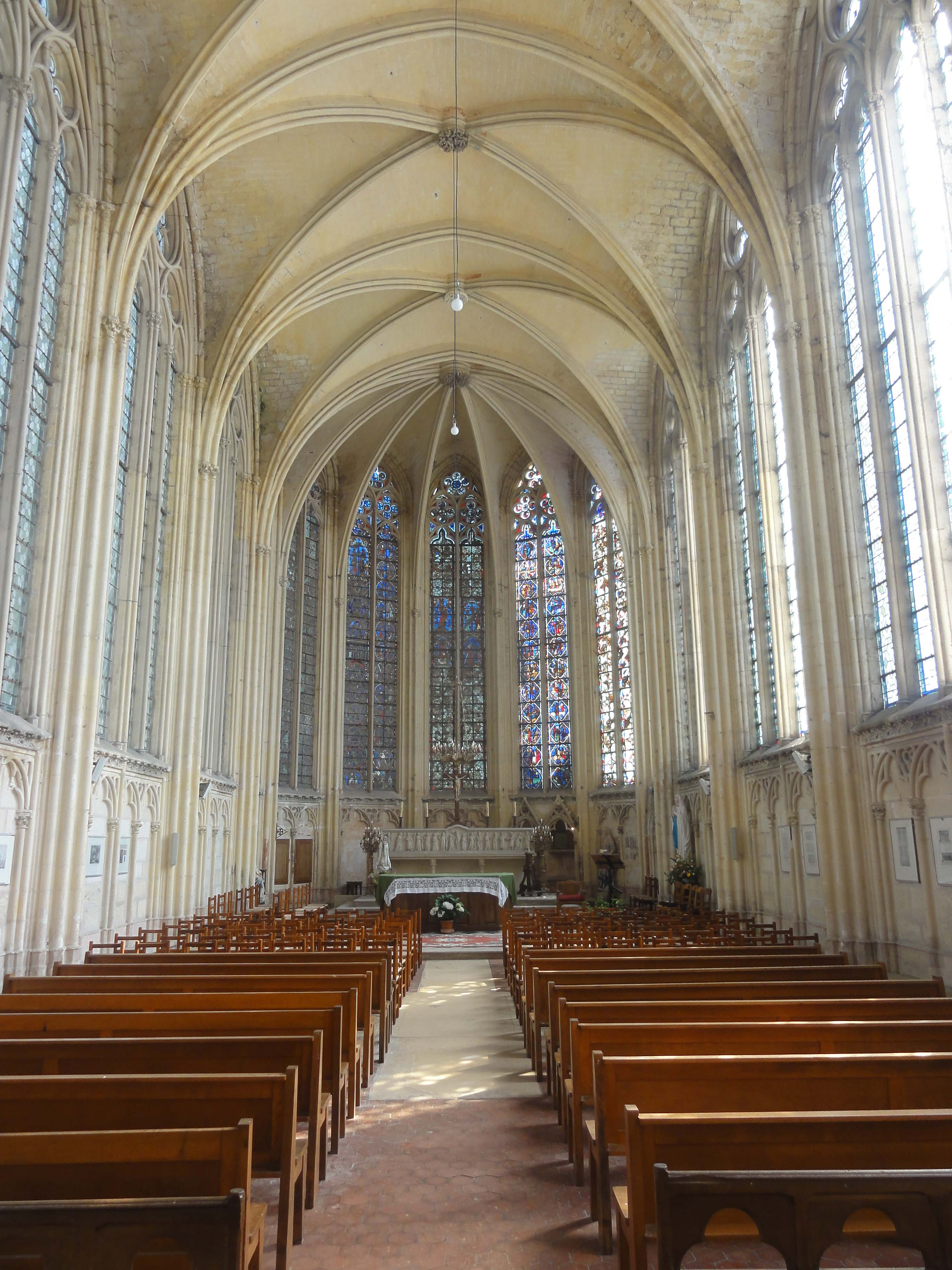 Intérieur de la chapelle de la Vierge (connue comme sainte-chapelle) - voir le titre du fichier.